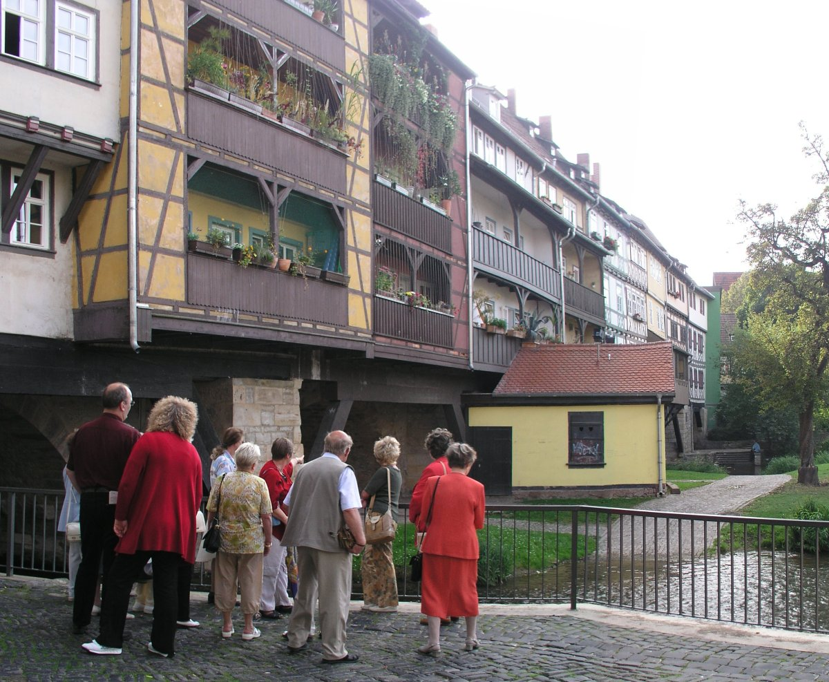 Hinter der Krämerbrücke